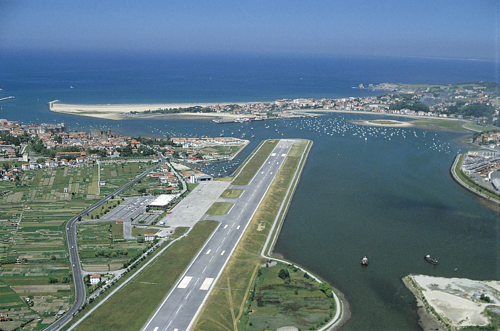 Txingudi badia, Bidasoaren itsasoratzea eta Hondarribiko aireportua